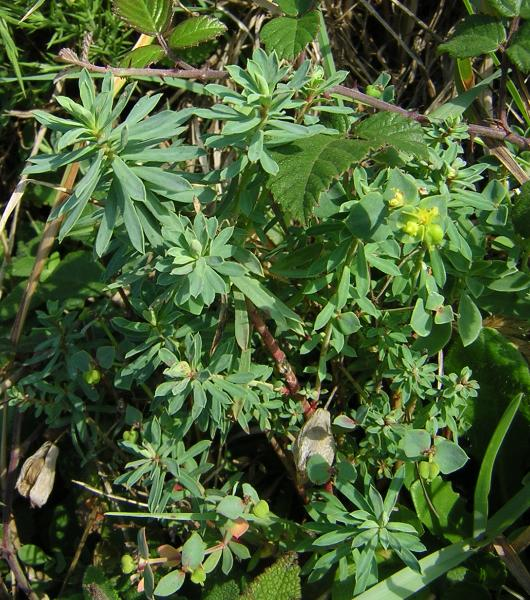 Euphorbia portlandica, Flamanville (Manche) - France